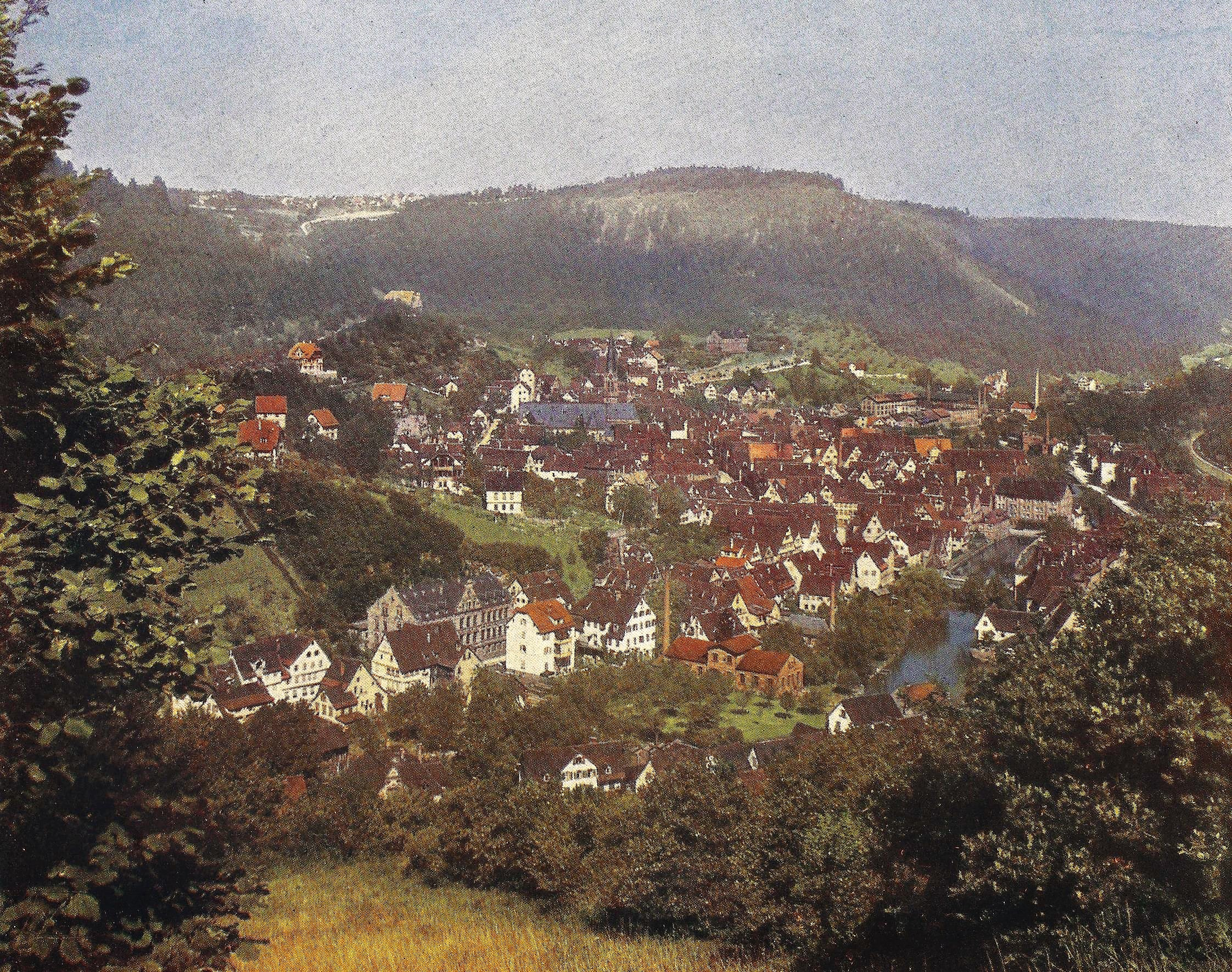 Farbfotografie nach den Autochromverfahren aus: Der Schwarzwald in Farbenphothographien, Wagner Freiburg 1910-1911, Tafel Nr. 46: Calw